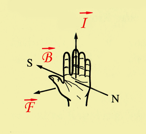 Left-hand_rule